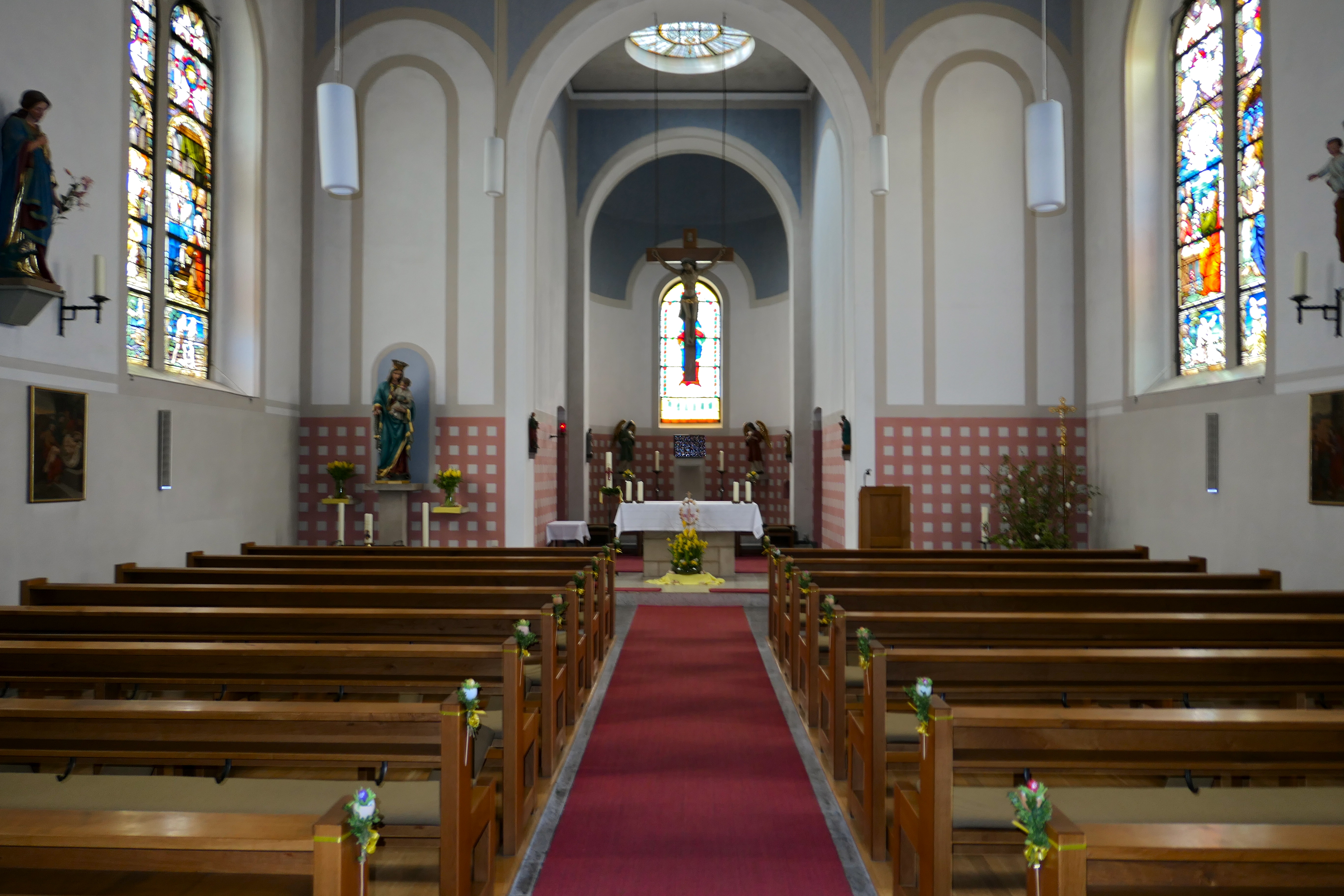 Bild vom Inneren der kath. Kirche St. Mariä Unbefleckte Empfängnis